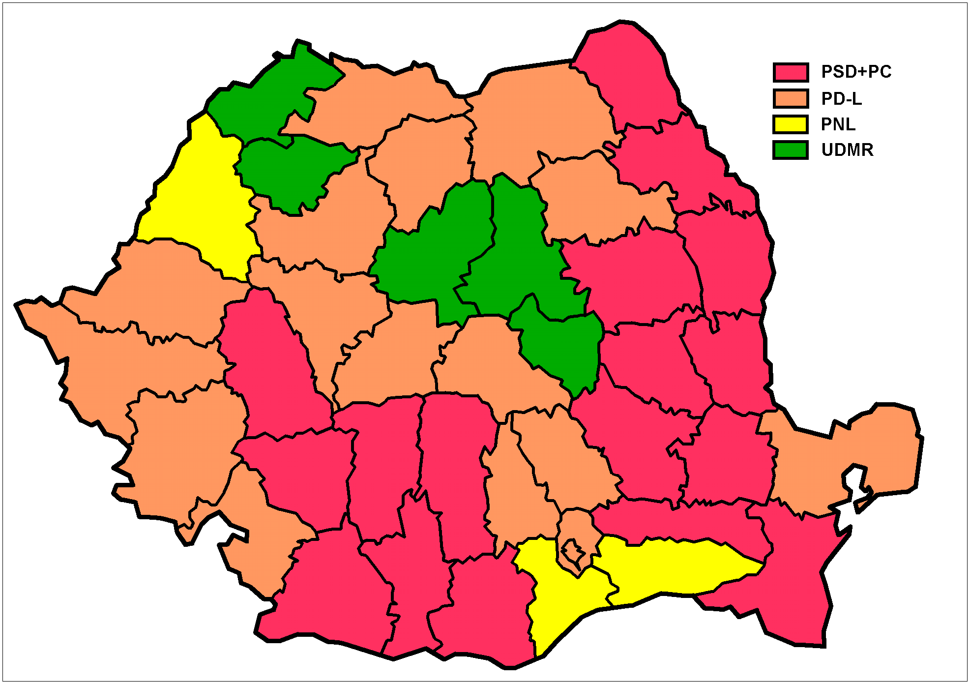 Parlamentswahlen Rumänien 2008, meisterrungene Stimmen nach Kreisen, Senat